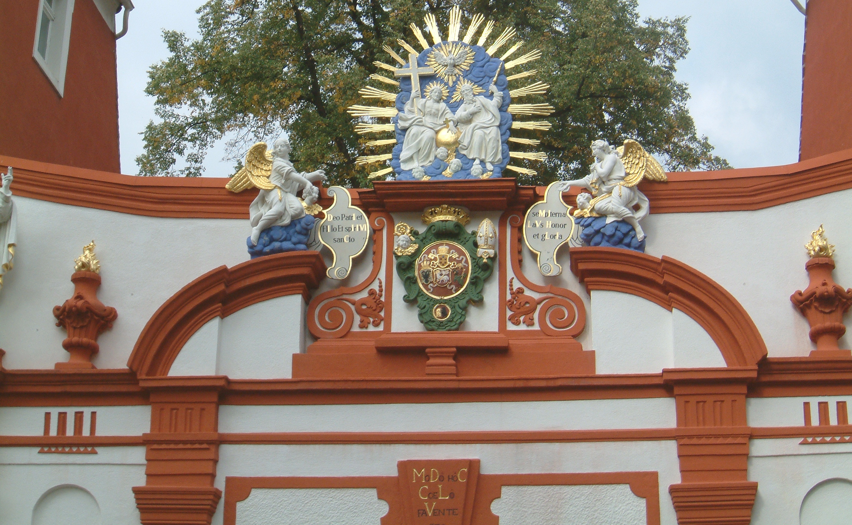 Domstift Bautzen_Portal Detail